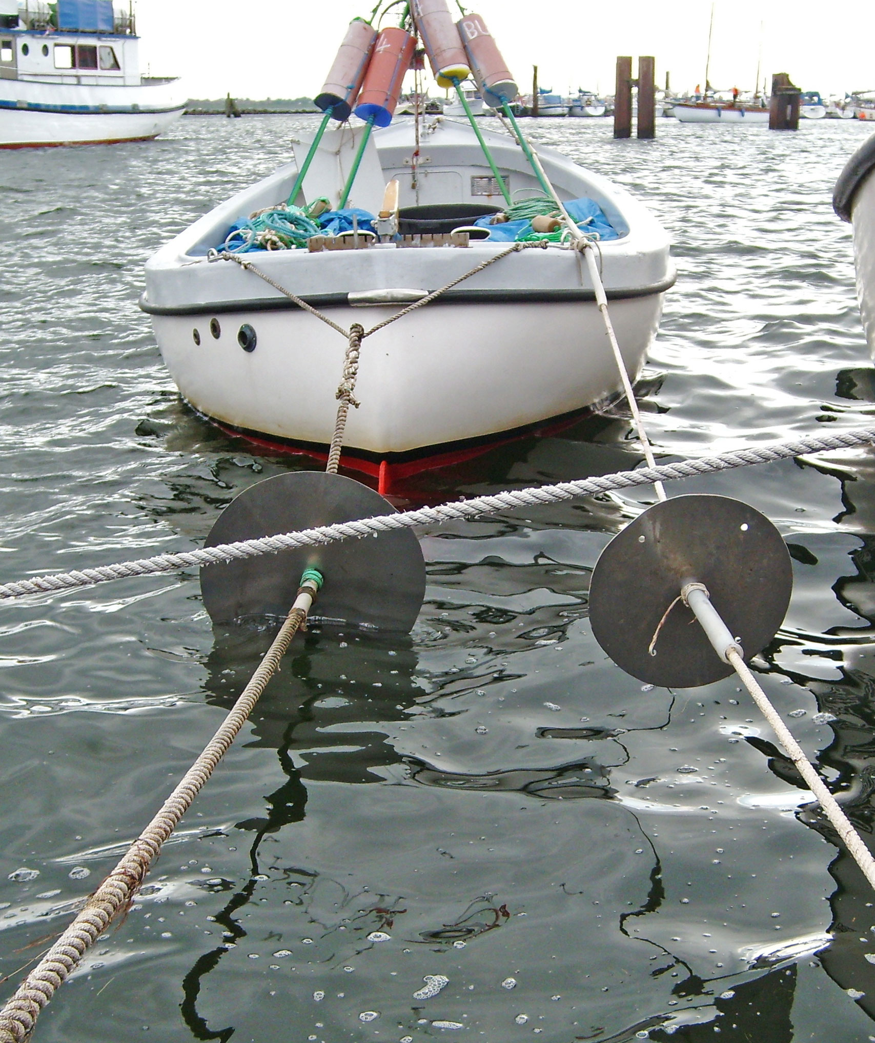 Rateblech